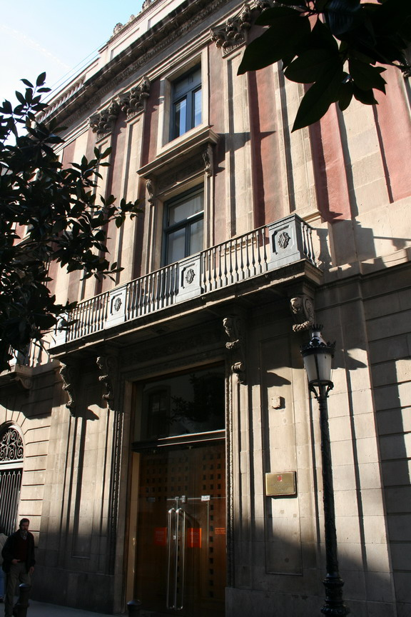 Palau del Marquès d'Alfarràs, seu de la sindicatura de greuges de Catalunya, al carrer Ample de Barcelona